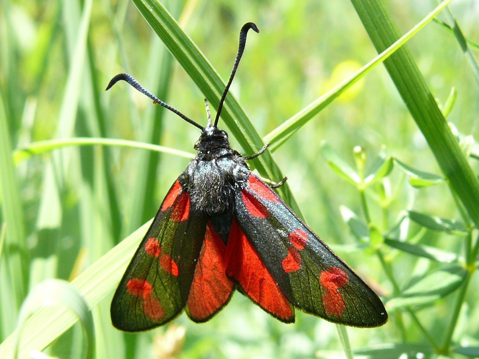 Zygaena filipendulae